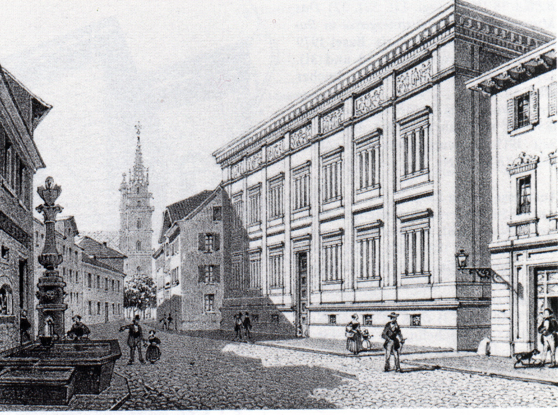 Museum an der Augustinergasse Basel, Blick in Richtung Münsterplatz. Vor dem 1849 erbauten Museum erscheint ein 1854 erbautes Nachbarhaus. Lithographie von L. Graf: Le nouveau Musée (à Basle).